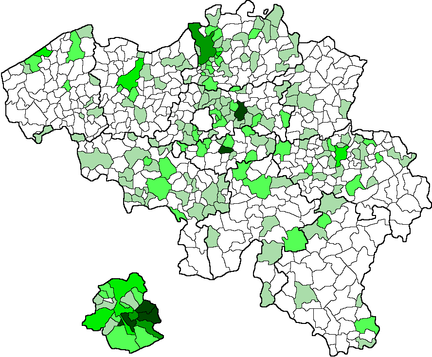 Deze kaart toont de verspreiding van Chinese buitenlanders (burgers van China zonder Belgisch paspoort) in België in 2017. Elke gemeente is ingekleurd naargelang de concentratieindex Chinese buitenlanders in die gemeente. De formule hiervoor is (#Chinese buitenlanders in gemeente/#Inwoners van gemeente)/(#Chinese buitenlanders in België/#Inwoners van België) * 100. Legenda: 500